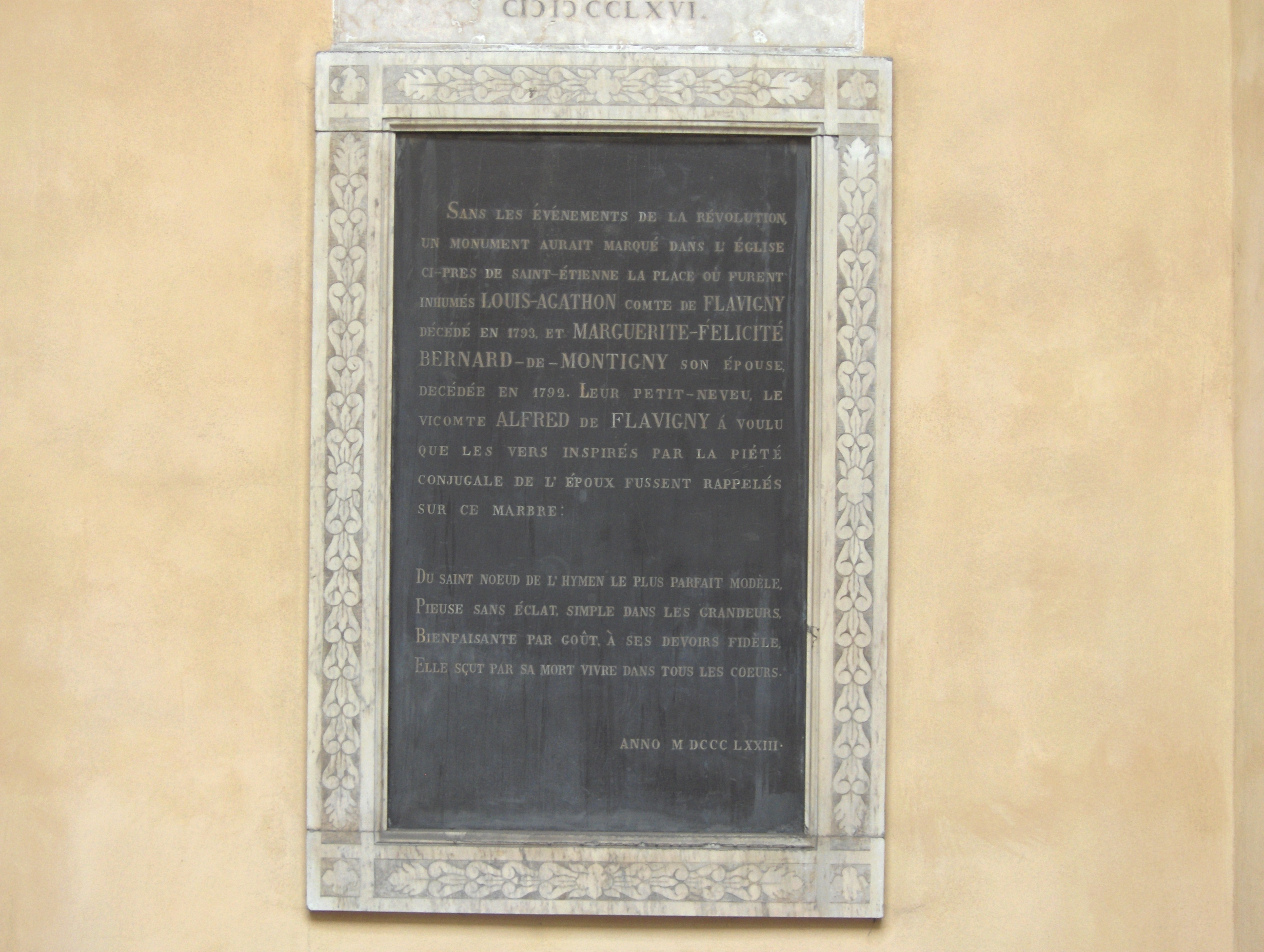 Photo de la plaque sépulcrale qu' Alfred de Flavigny, petit neveu de Louis-Agathon de Flavigny de Renansart, a fait mettre le 26 septembre 1876, dans la demi-rotonde de la porte de l’église Saint-Antoine, à Parme. Il a lui-même écrit ces vers inspirés par la fidélité conjugale de son grand-oncle pour son épouse décédée le 16 décembre 1792.